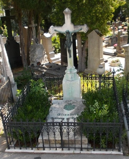 Grab Erzherzogin Elisabeth-Helenenfriedhof Baden